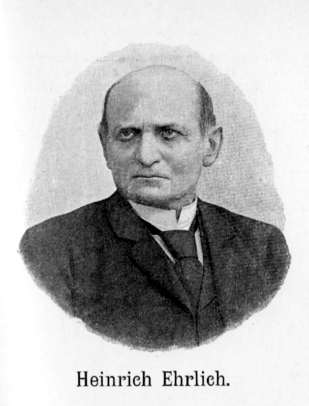 Porträt Heinrich Ehrlich